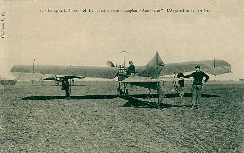 Antoinette VI in contemporary postcard circa 1909